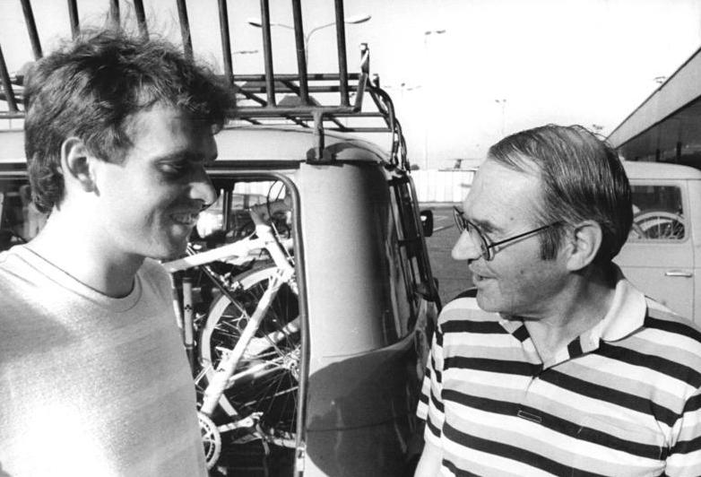 Olaf Ludwig, Werner Marschner Zum Beitrag: Hoffnung auf´s Rennen am Montello - Vom Trainer und vätrlichen Freund Olaf Ludwigs ADN-ZB Link - 14.8.1985 - Olaf Ludwig mit seinem langjährigen Trainer und väterlichen Freund Werner Marschner (rechts) nach der Rückkehr am 11.8.85 von einem Rennen in Griechenland.